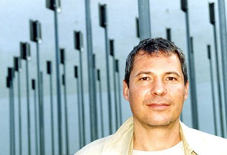 Foto von Intendant Sven Grunert